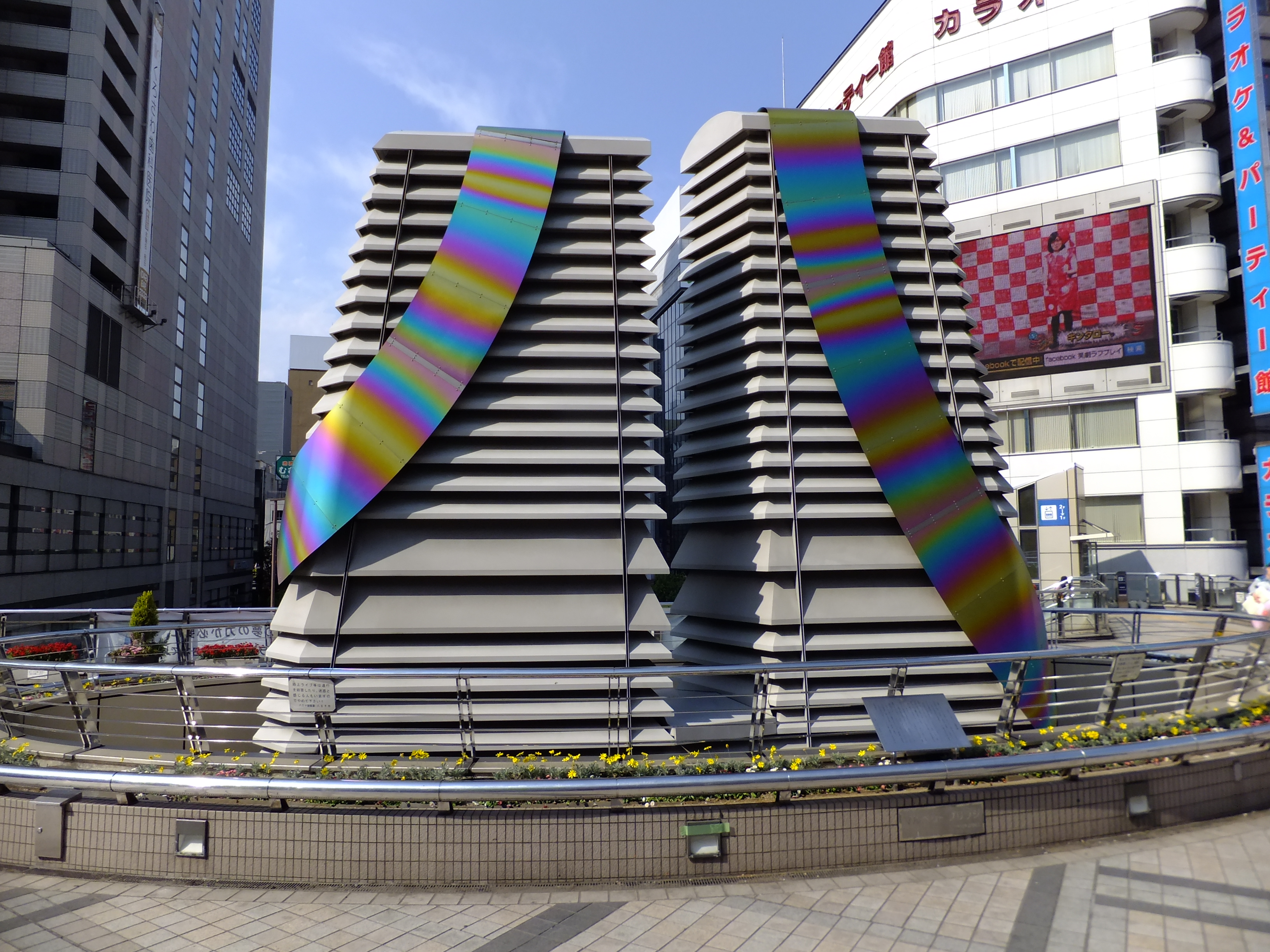 八王子駅前のモニュメント。漢字の「八」を象っている。